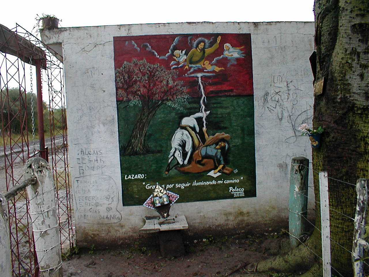 Imagen de mural en templete del Lázaro Blanco